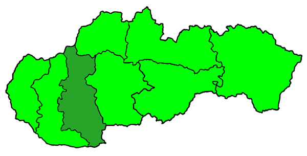 Mappa della diocesi cattolica (roman catholic) di Nitra, in Slovacchia. Lavoro personale.